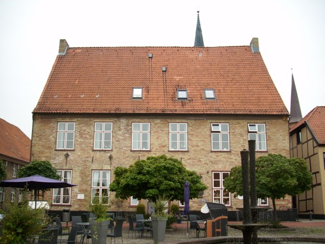 Hofapoteket ved Rådhuspladsen i Slesvig